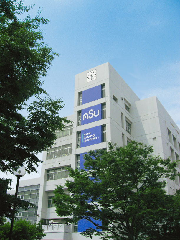 愛知産業大学の外観です。